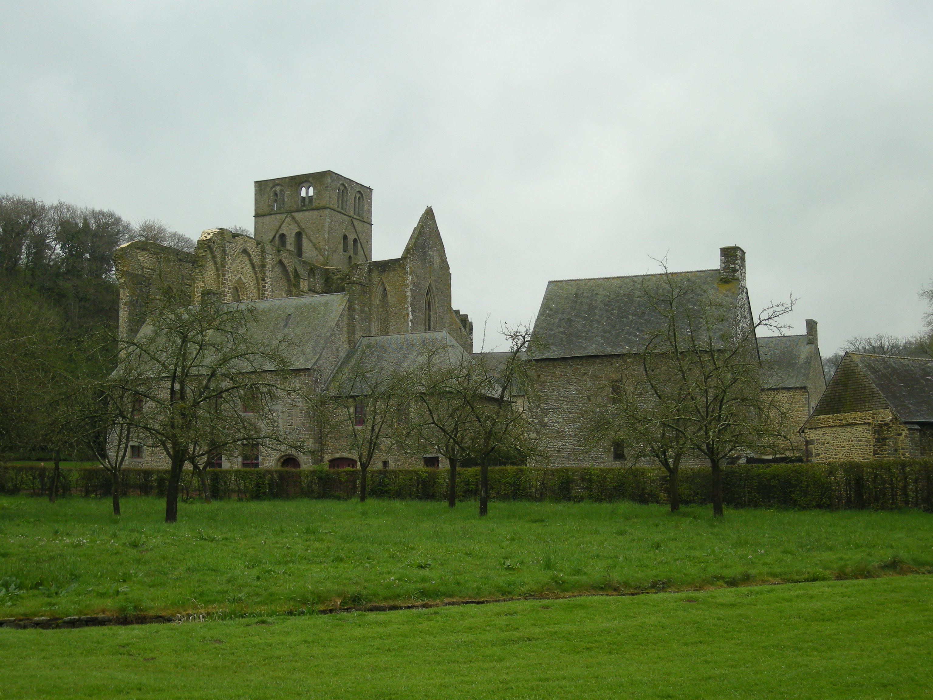 Abbaye de Hambye (Normandie)